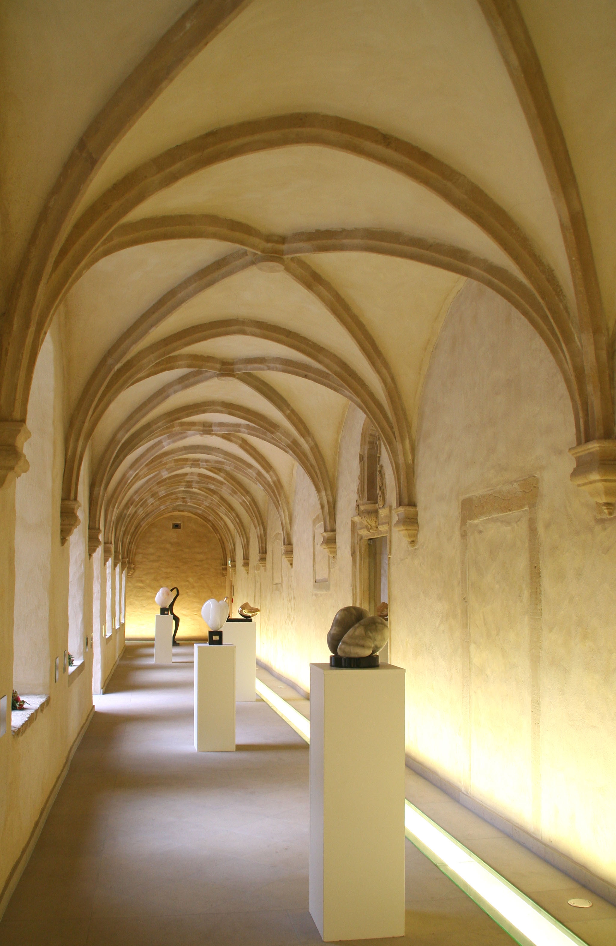 Neimënster Kräizgank mat Wercollier-Wierker